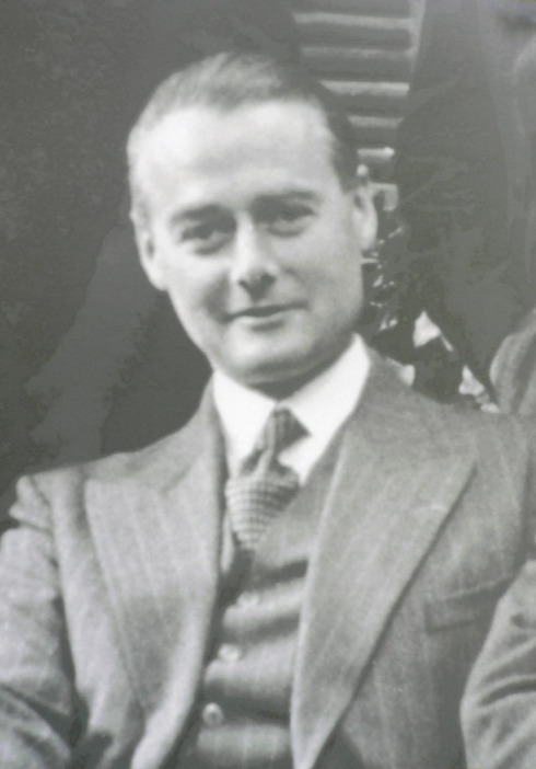 Détail d'une photographie représentant Henri Frager avec l'équipe de son cabinet d'architecte, boulevard Montparnasse, c. 1935. Photographie issue d'une collection familiale.